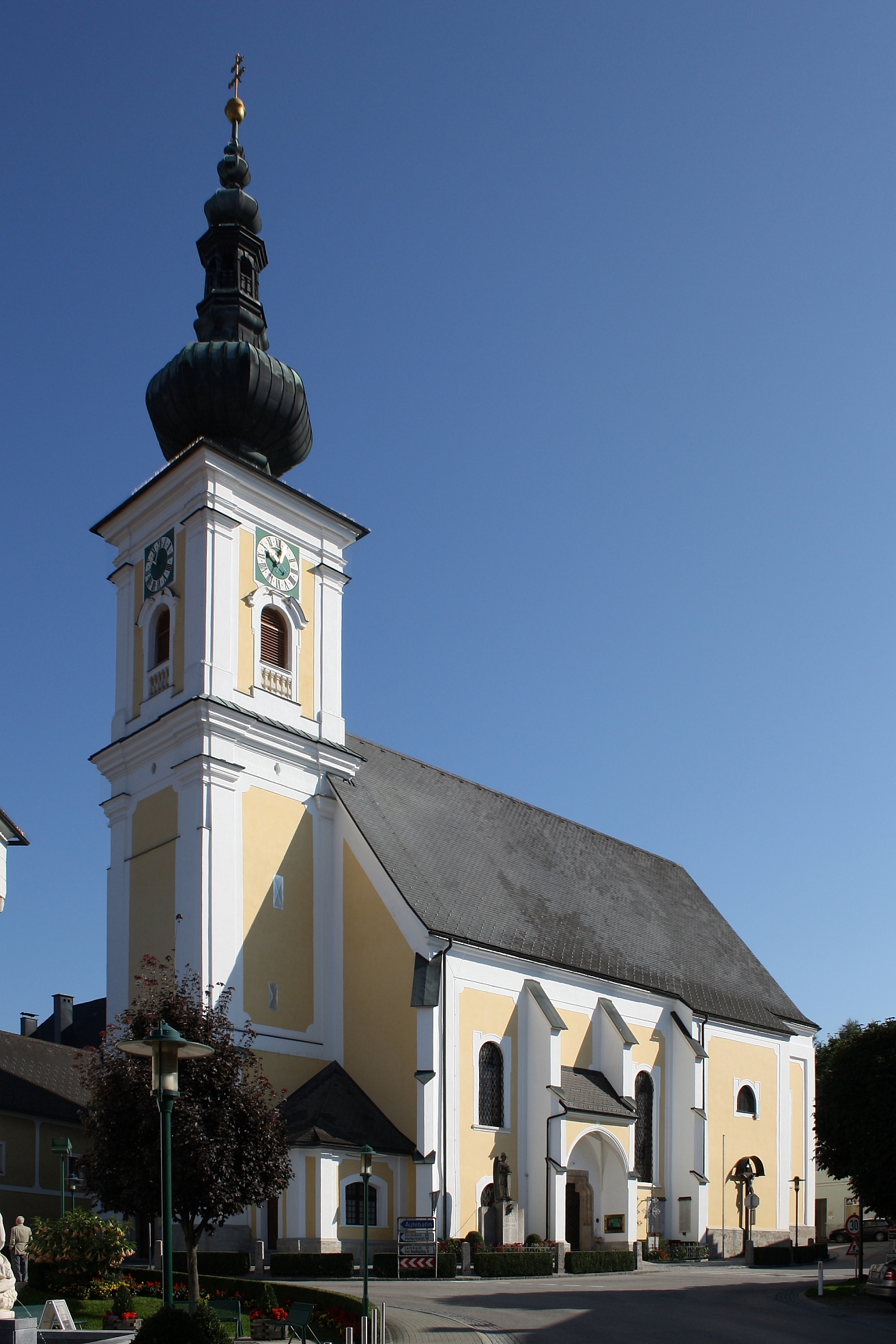 Pfarrkirche von der oberösterreichischen Gemeinde Vorchdorf.